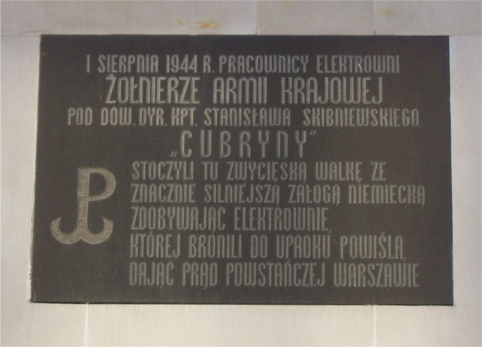 tablica pamiątkowa, ul. Tamka, Powiśle w Warszawie (fot Zu)